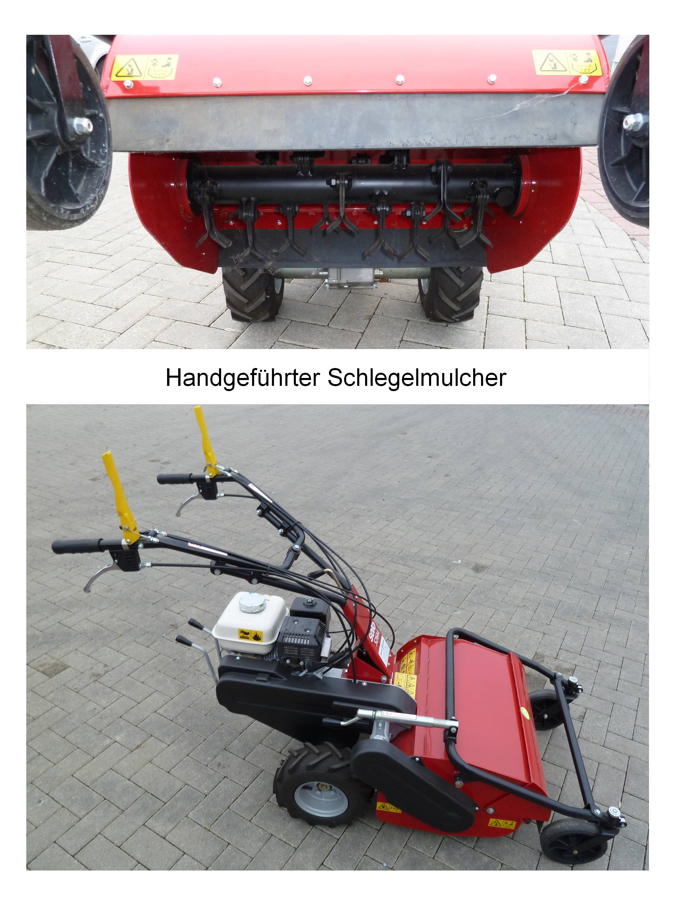 Schlegelmäher, handgeführt, mit Benzinmotor und mechanischem Radantrieb, Schnittbreite 60 cm.